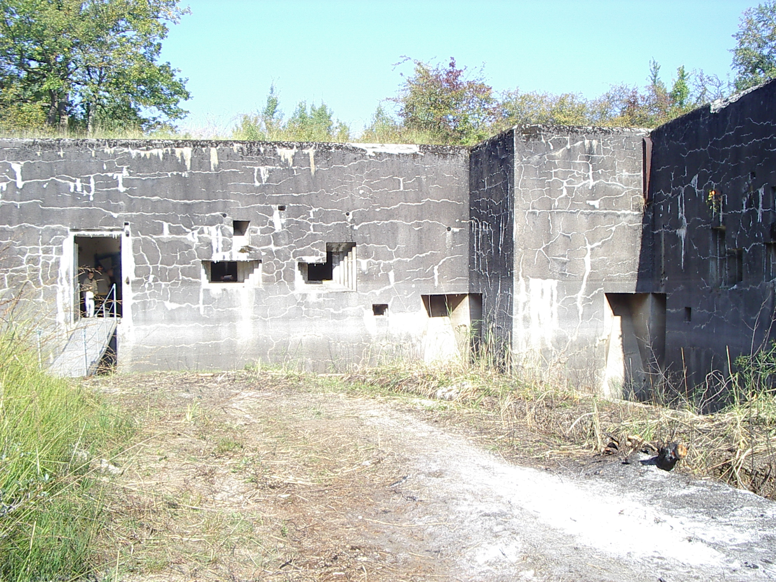 coffre double u fort de Vieux-canton